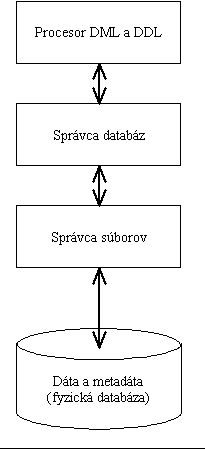 Architektura vseobecneho SRBD